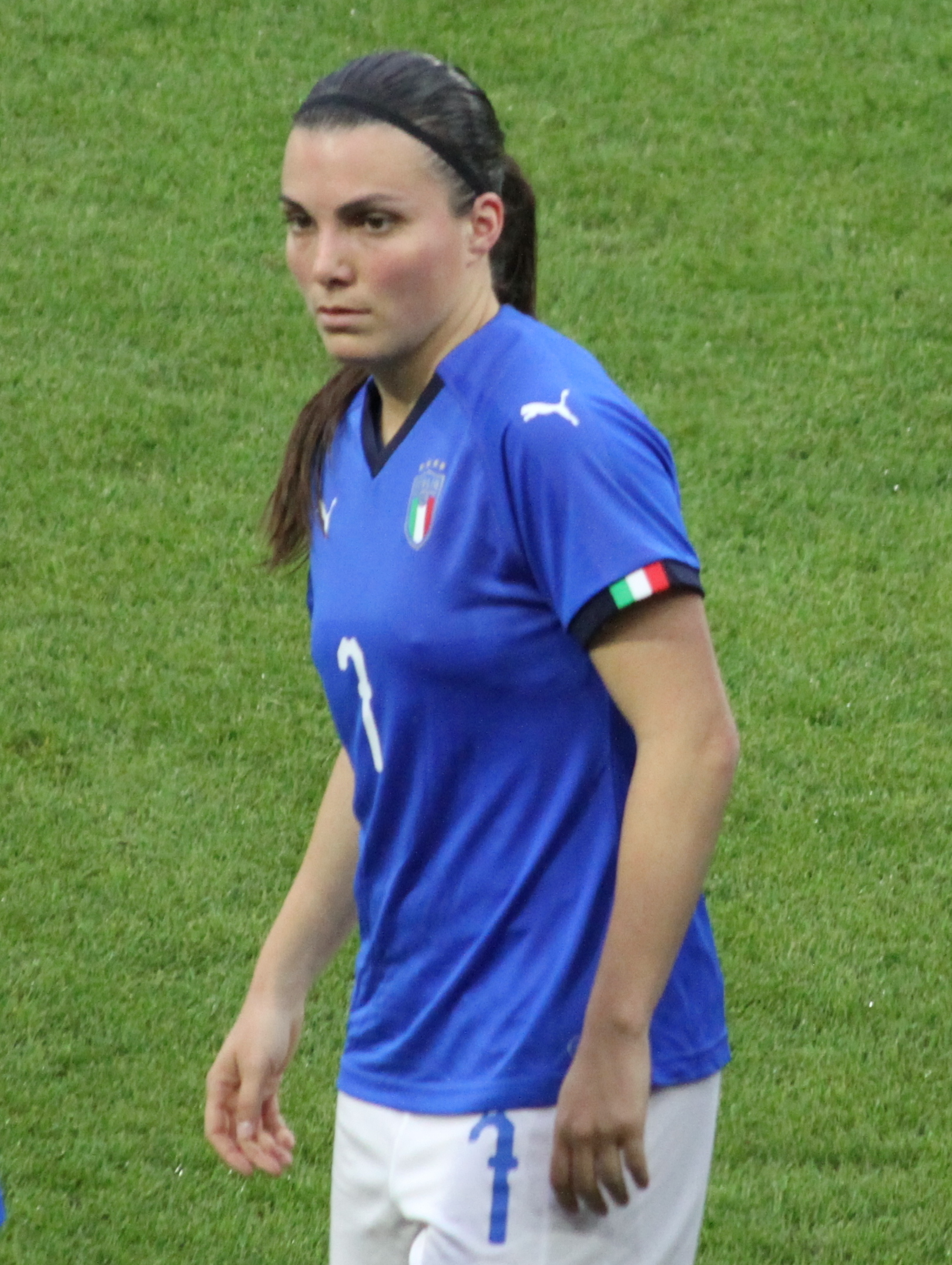 Ferrara (Italia), stadio Paolo Mazza, 10 aprile 2018. Italia vs Belgio, qualificazioni al Mondiale di Francia 2019: la difensore italiana Alia Guagni in azione.